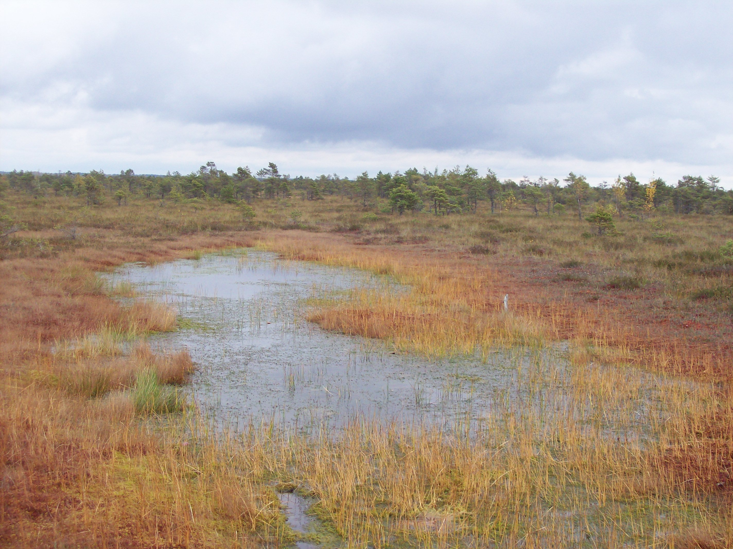 Kemeri swamp